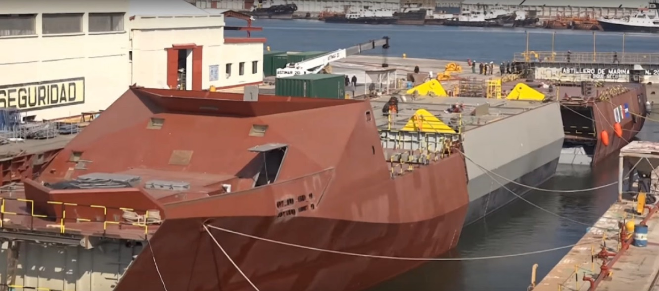 Pola dique seco modulos 1 2 3